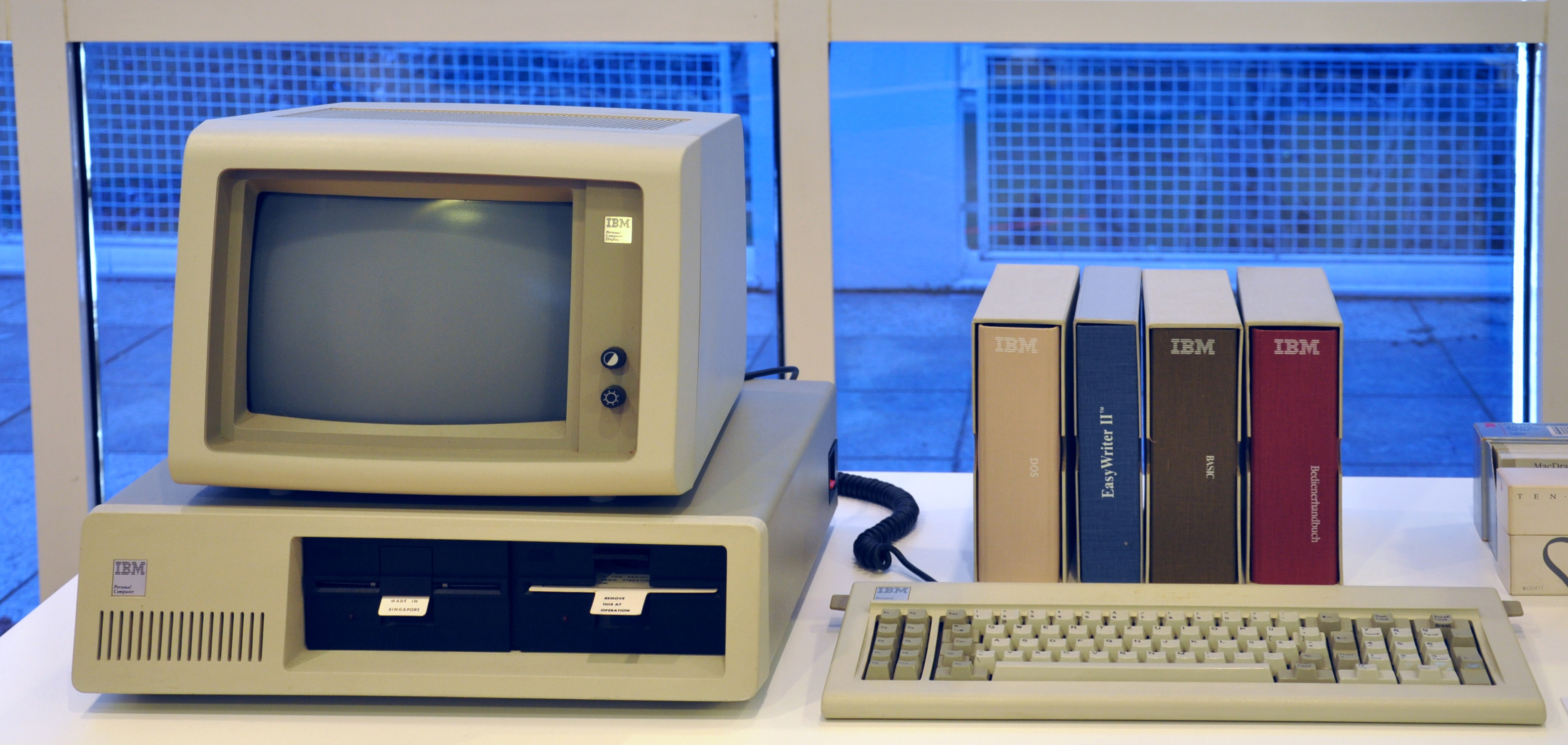 IBM Personal Computer, 1981, mit Handbüchern; Museum für Angewandte Kunst, Frankfurt am Main